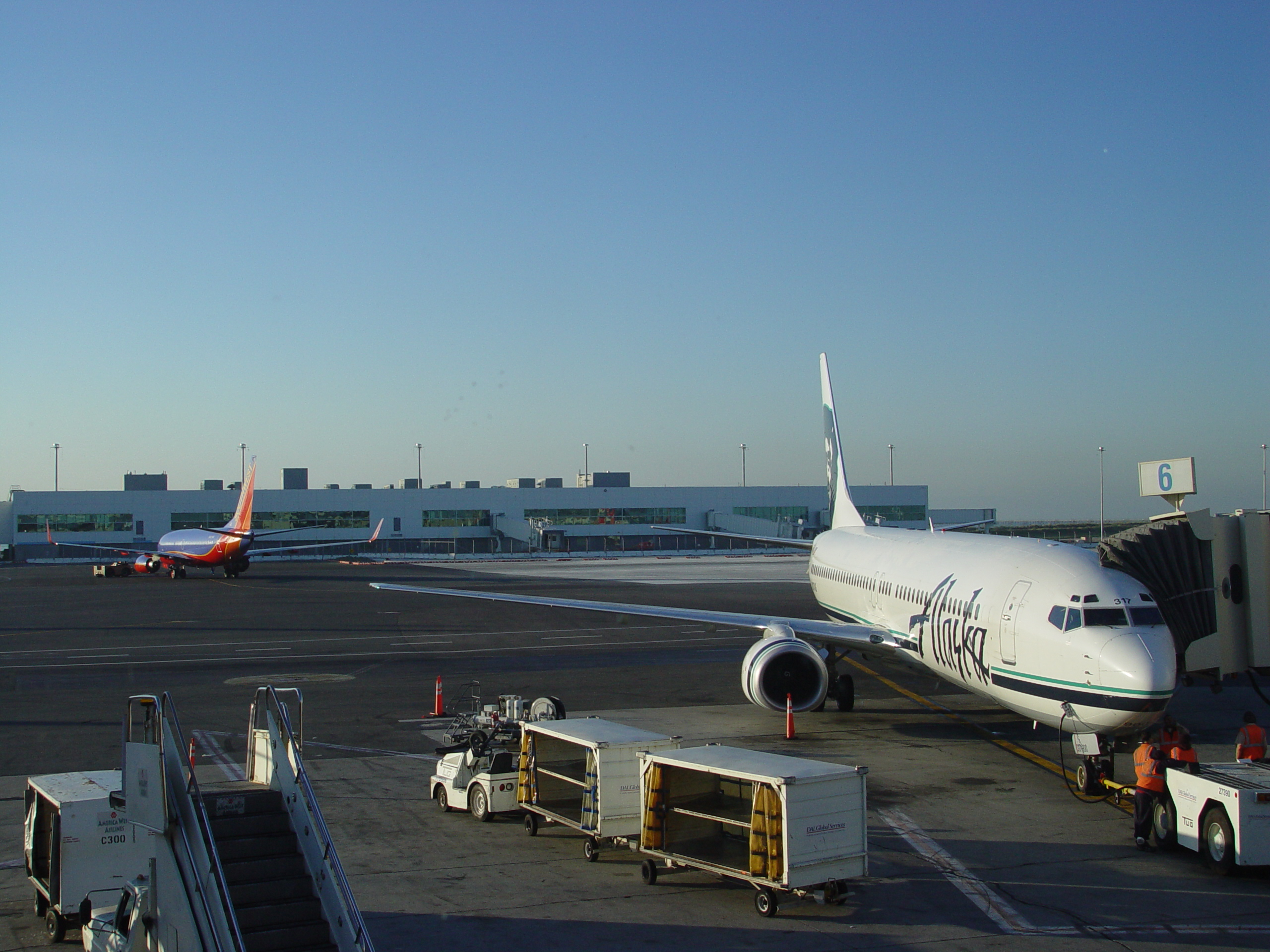 Two Boeing 737s. Alaska Airlines Boeing 737-900 (N317AS) Other versions: Image:Alaska Airlines 737-900.JPG